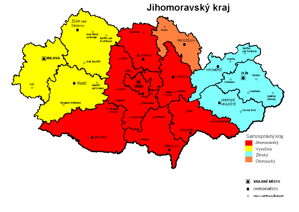 Mapa Jihomoravského kraje (1960-1990). Upraveno z map NUTS z české wikipedie